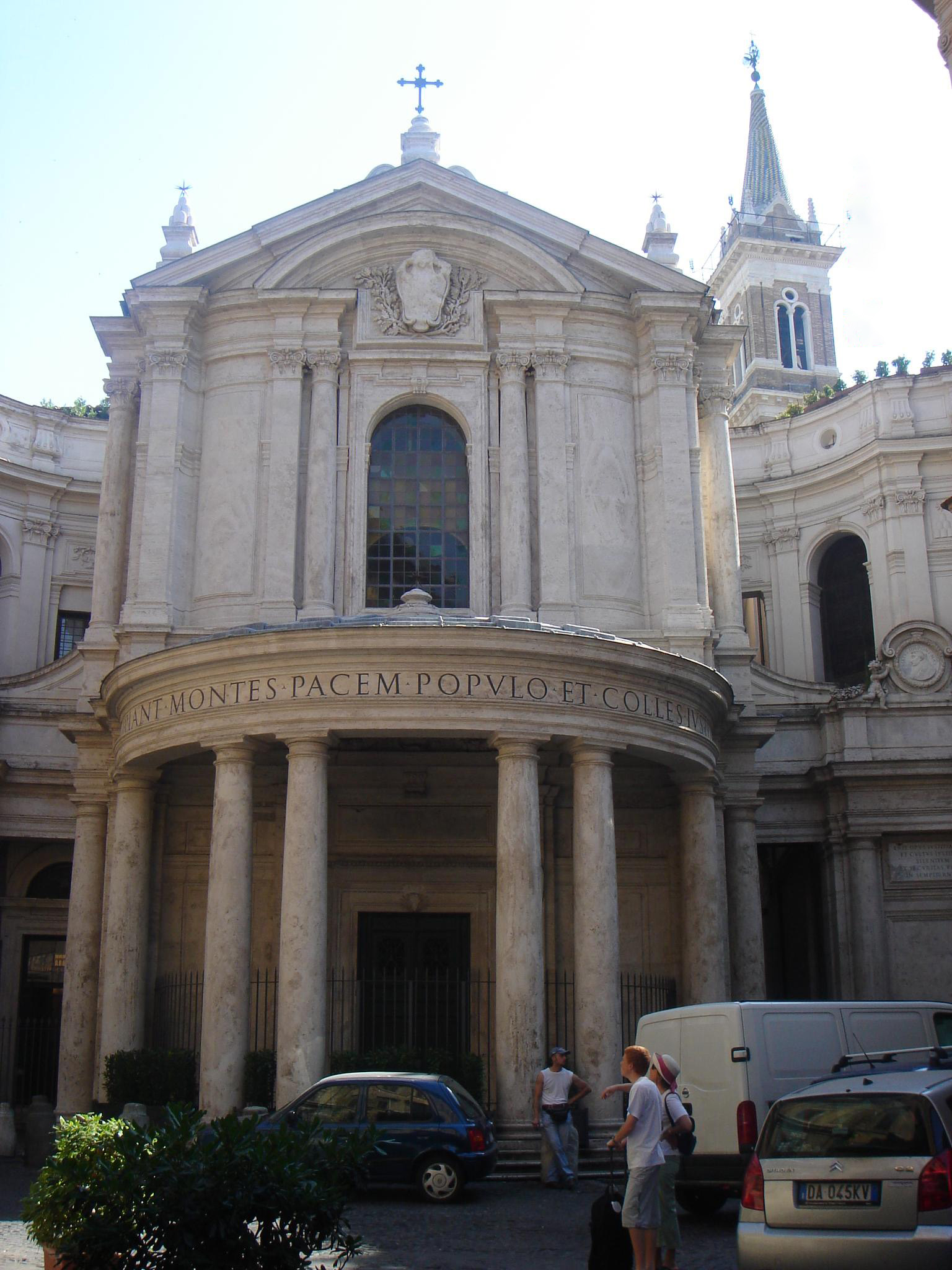 Roma, santa Maria della Pace